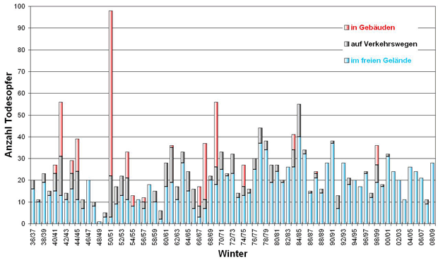 Zahl der Lawinentoten in der Schweiz 1937-2009